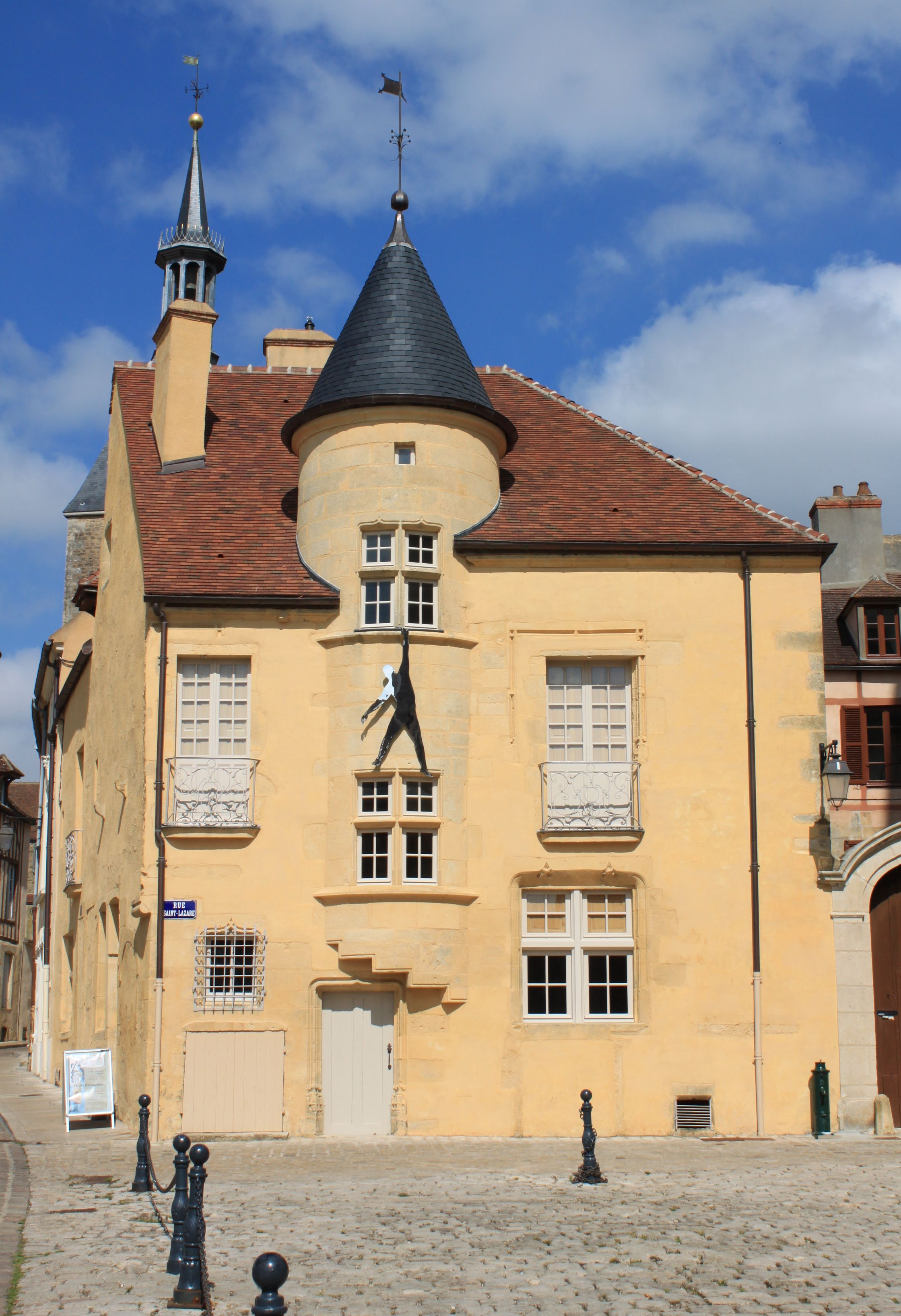 La maison des sires de Domecy construite par la famille de Salins à Avallon (Yonne, Bourgogne, France).